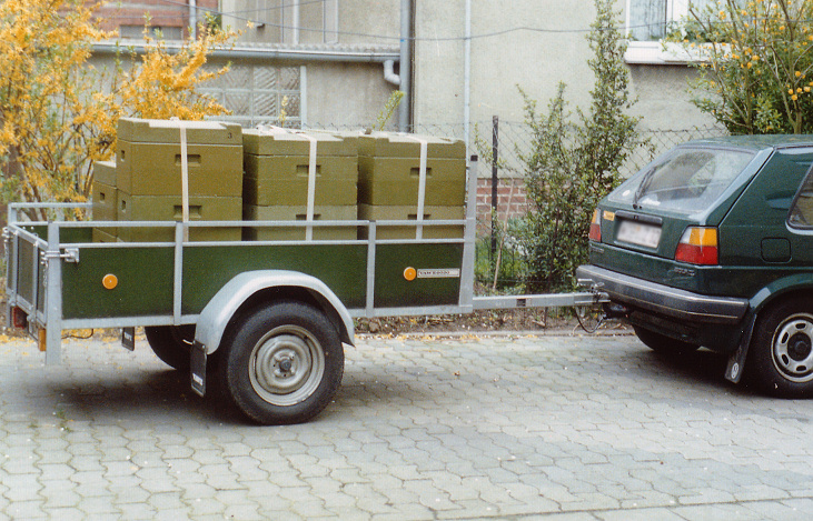 Bienenwanderung